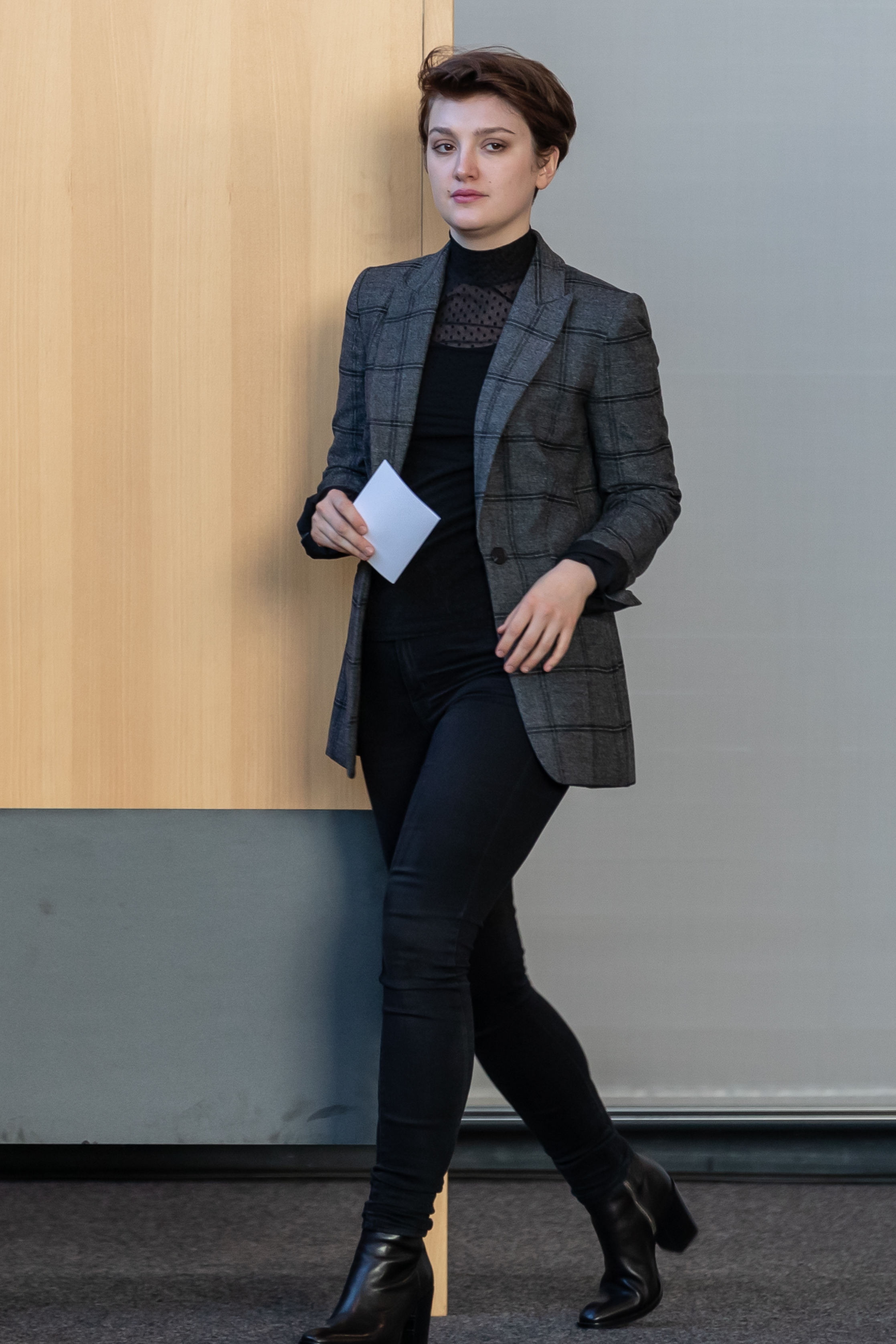 Thüringer Landtag, Wahl des Ministerpräsidenten: Katja Maurer (Die Linke) bei der Stimmabgabe